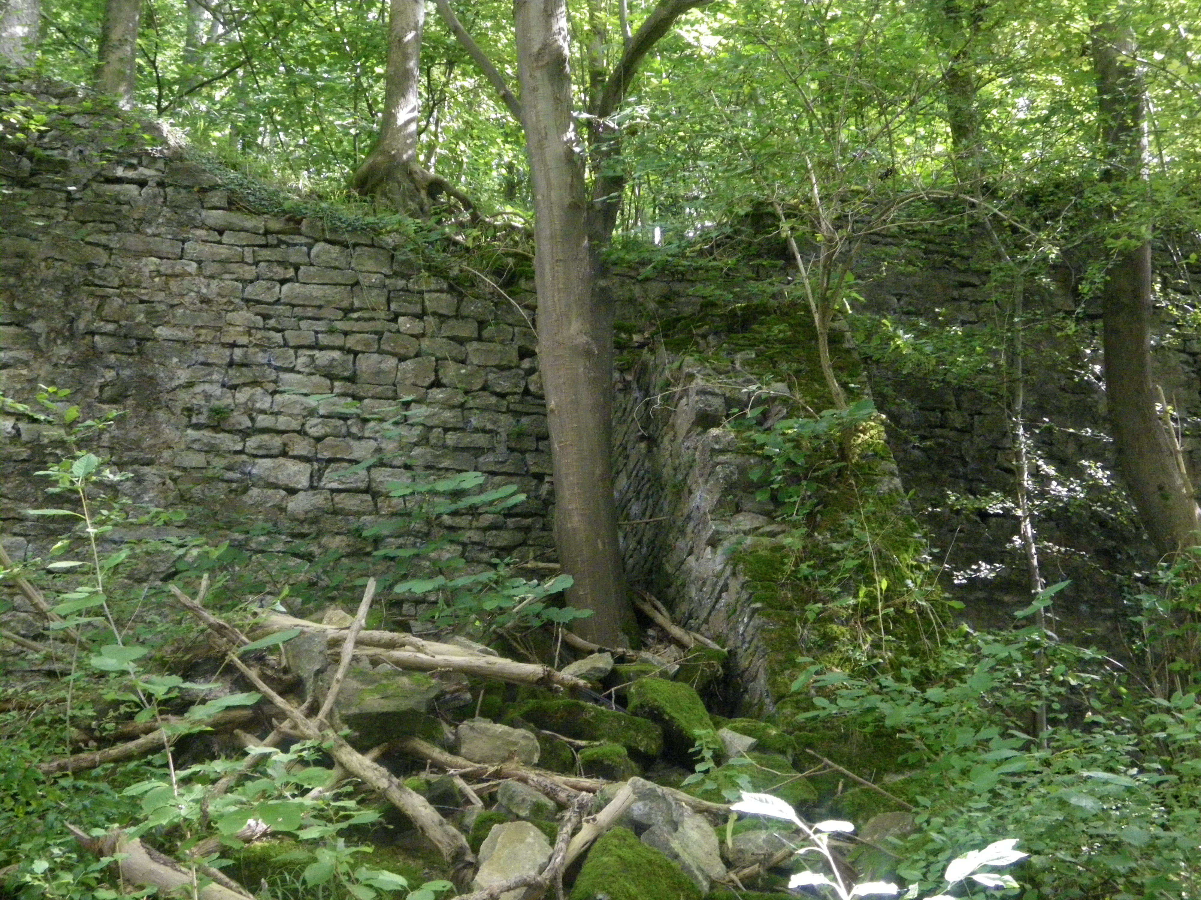 Ruinen der "Sorg", Stützmauer